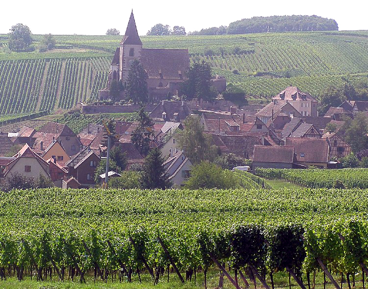 Beschreibung: Ansicht von Hunawihr / Hunawihr et son église fortifiée. Copie de la wikipédia allemande (article Hunawihr) Quelle: fotografiert im August 2005 Fotograf: Oswald Engelhardt